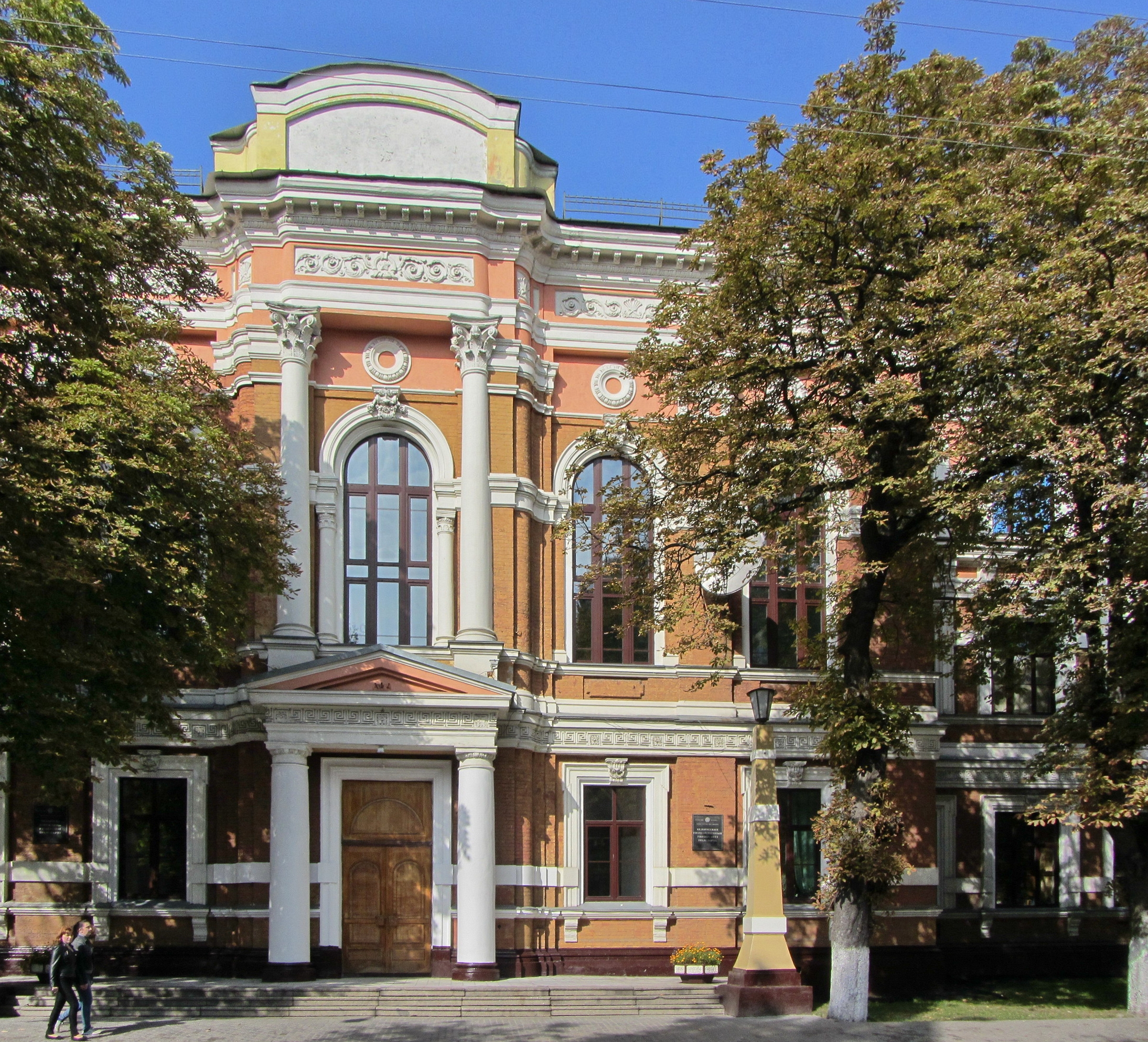 Беларуская (тарашкевіца): Будынак былой мужчынскай гімназіі. г. Гомель This is a photo of Belarusian heritage monument. Reference number: 312Г000039 ( WLM)